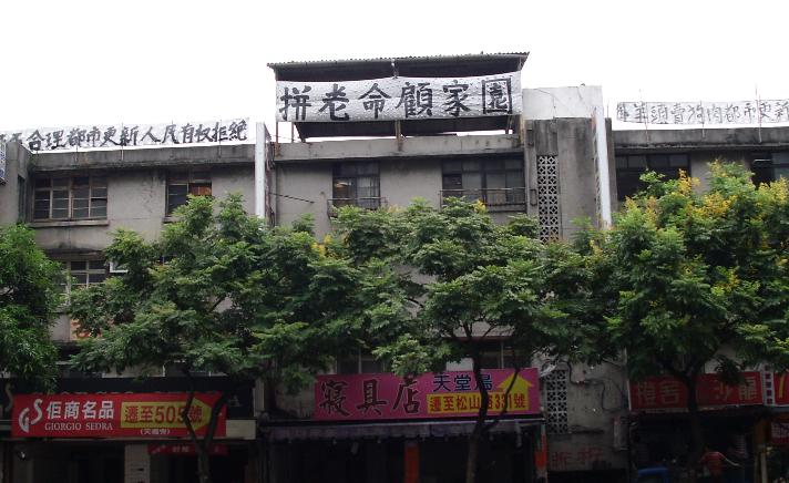 Bân-lâm-gú: 佇臺北的市民抗議都市更新布條；永春都更案。